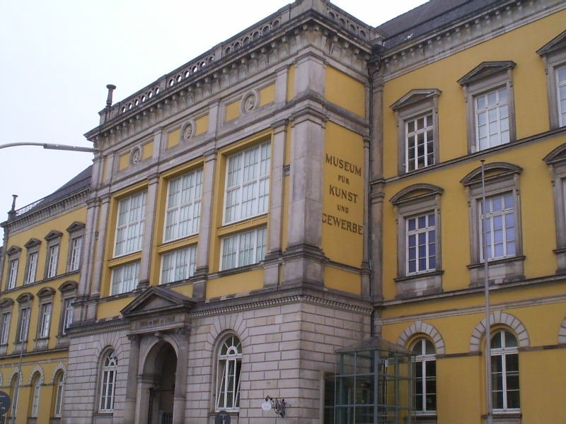 Das Museum für Kunst und Gewerbe wurde 1874 bis 1876 nach Plänen des Leiters des Hamburger Hochbauwesens Carl Johann Christian Zimmermann errichtet. Zunächst beherbergte das Gebäude neben dem Museum auch die Realschule des Johanneums, die allgemeine Gewerbeschule, die Schule für Bauhandwerker sowie botanische und völkerkundliche Sammlungen, die später sämtlich eigene Gebäude erhielten.